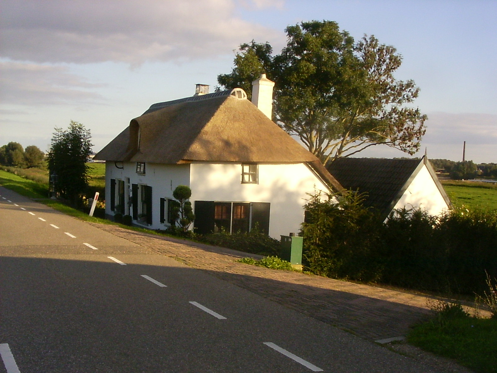 Slijk-Ewijk, Waaldijk 28